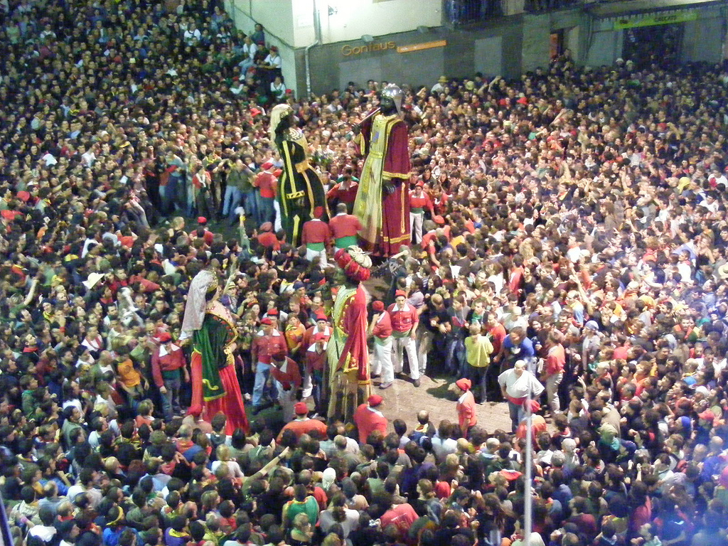 4t Salt - Gegants, 2009